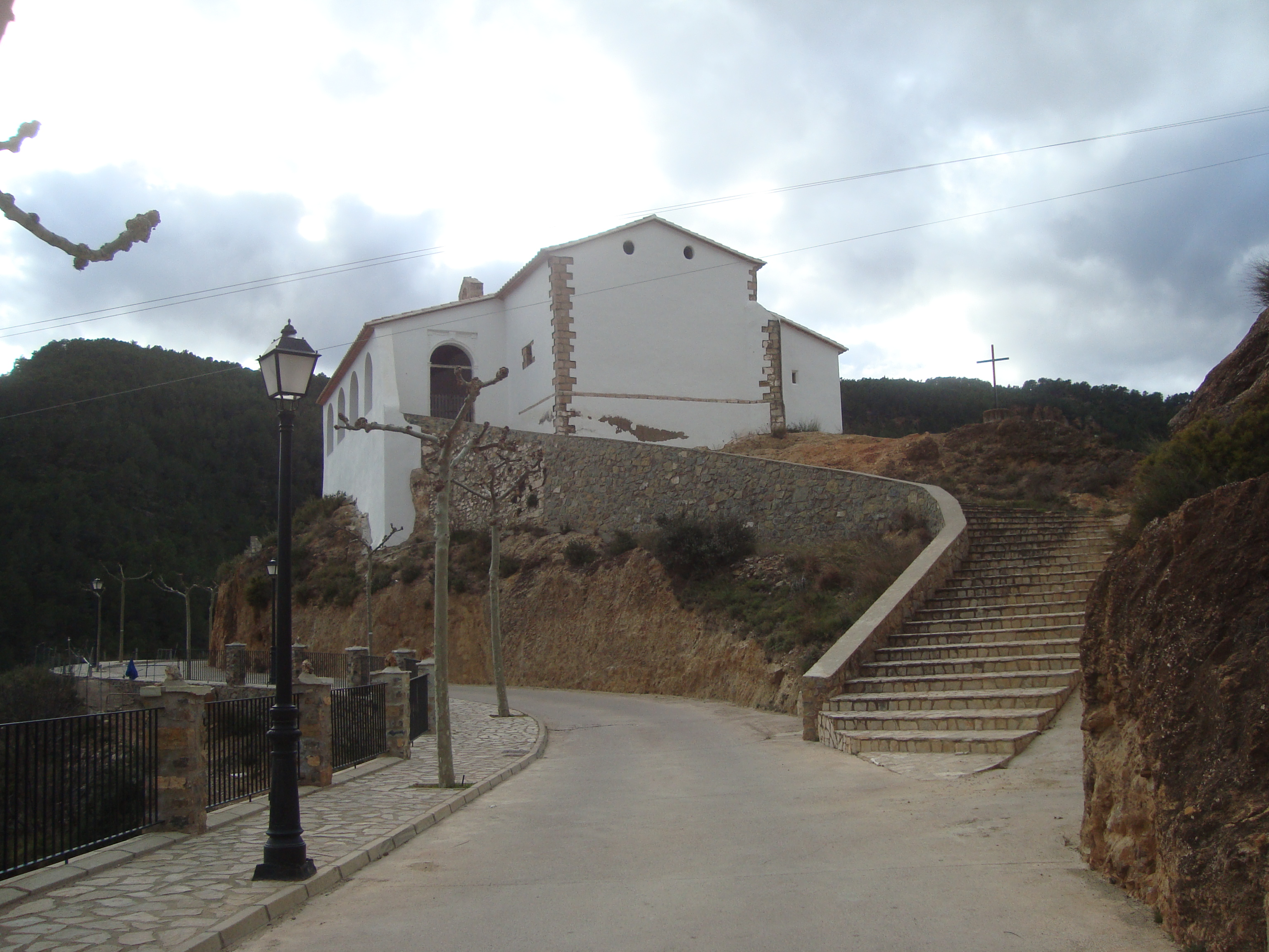 Ermita de Sant Antoni (Vilafermosa) 08.130-003.